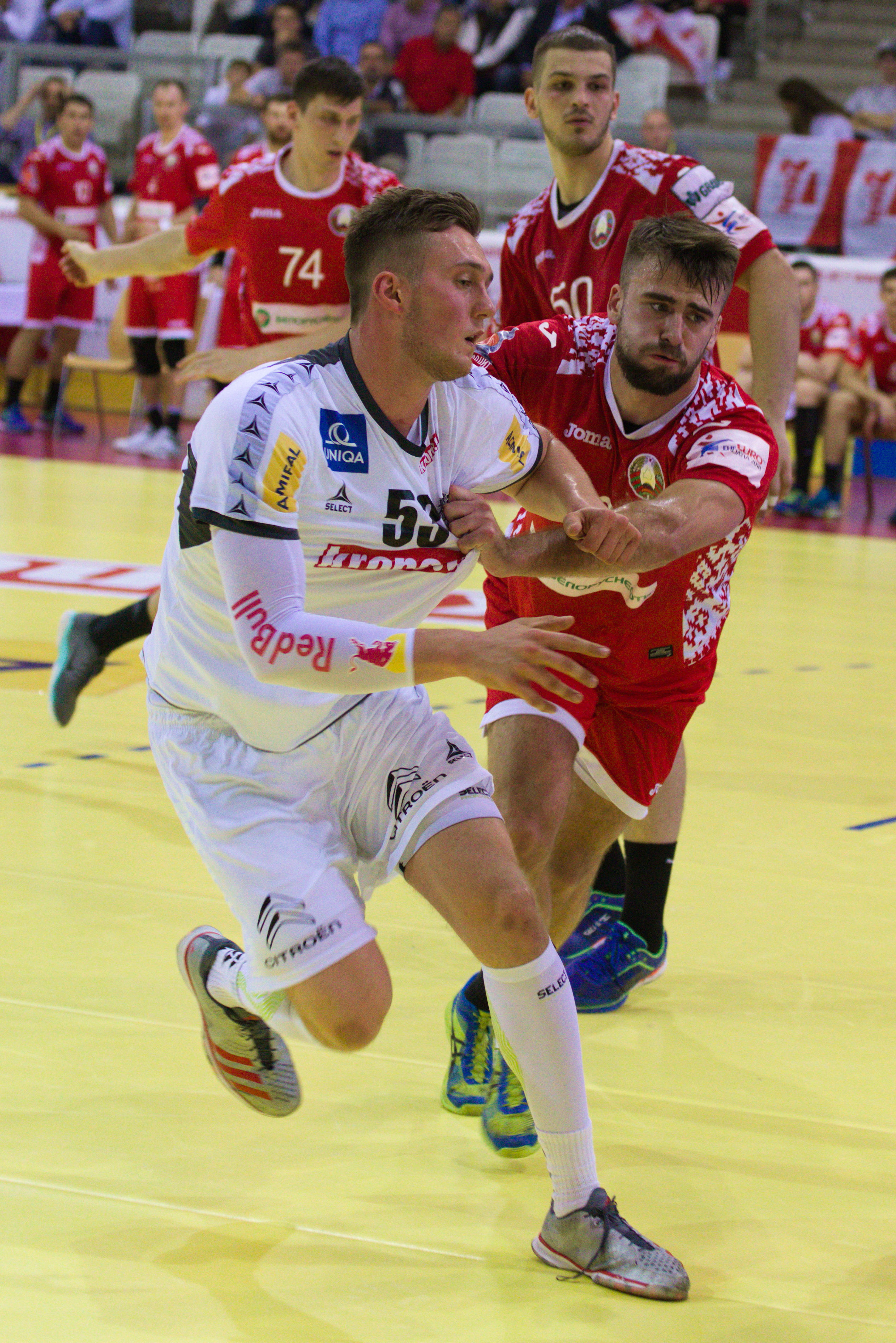 Handball-WM-Qualifikationsspiel zwischen Österreich und Weißrussland in Wien, 13. Juni 2018: Nikola Bilyk (im weißen Dress), im Zweikampf mit Wadsim Hajdutschenka, hinter letzterem Arzjom Karaljok